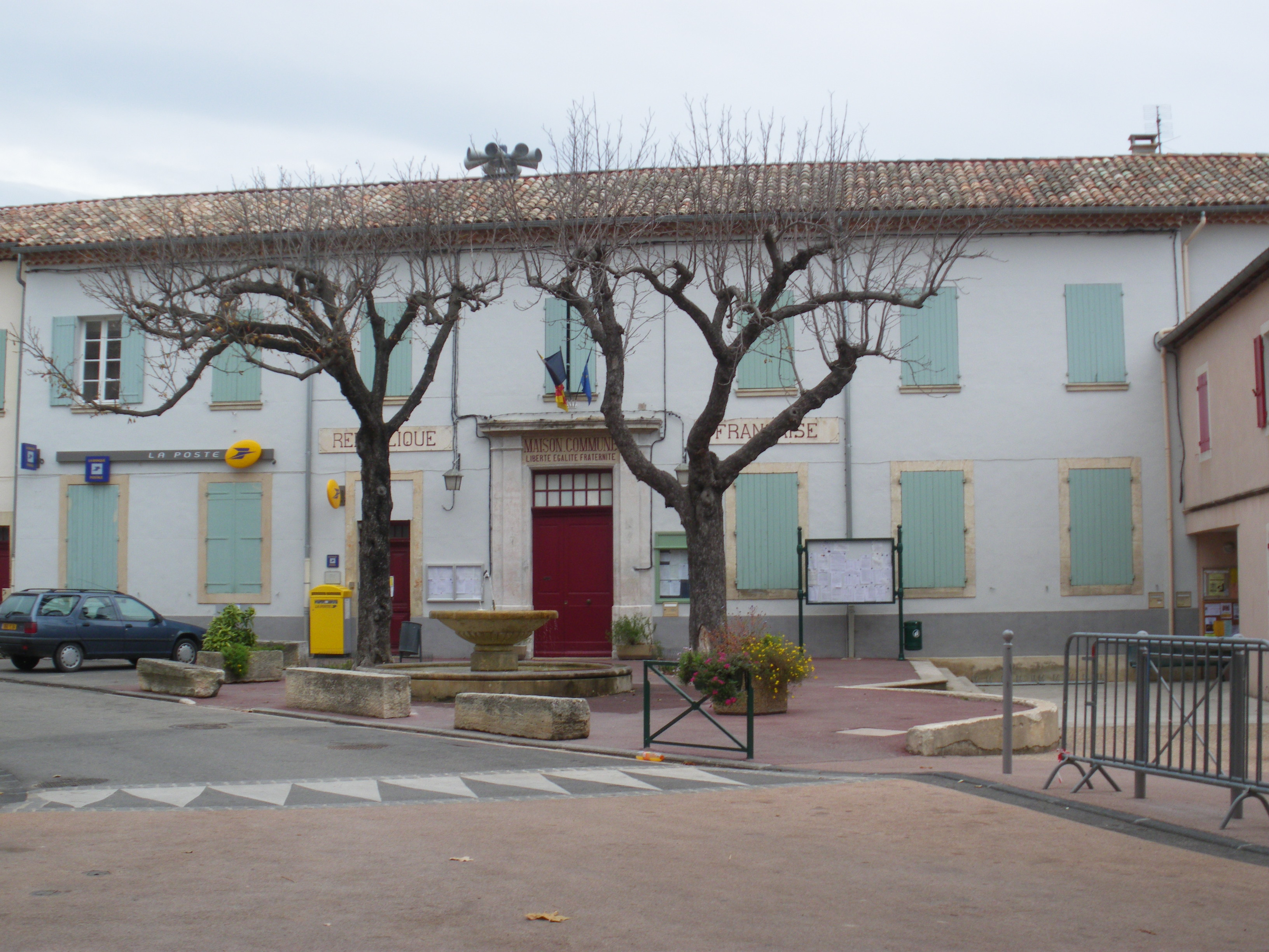 Mairie de Villes sur Auzon, Vaucluse